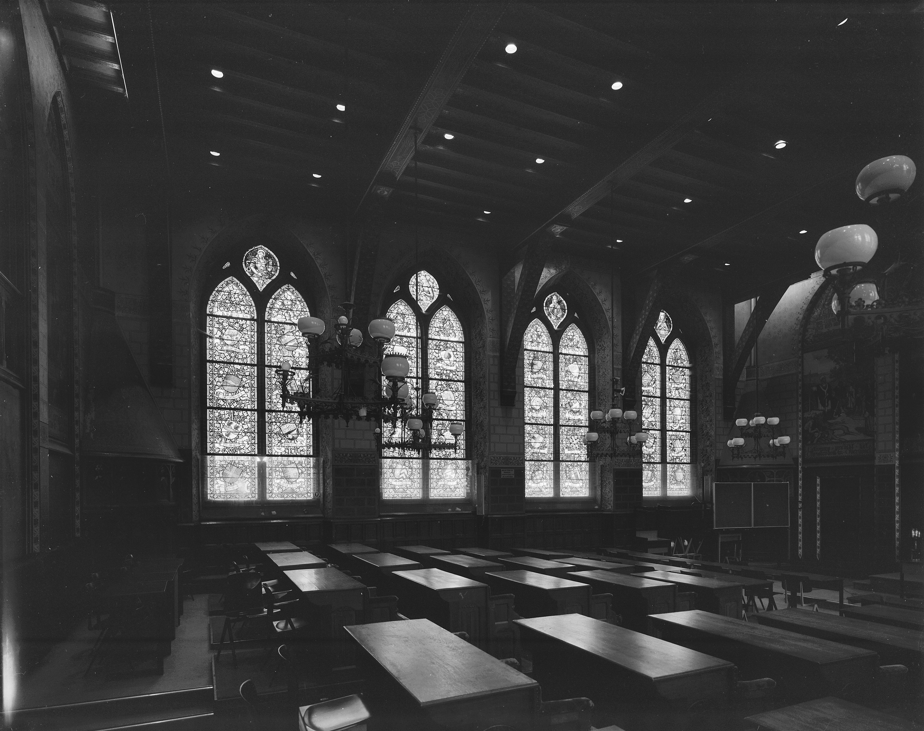 voormalig Provinciehuis: interieur glas in loodramen in statenzaal 1e verdieping.